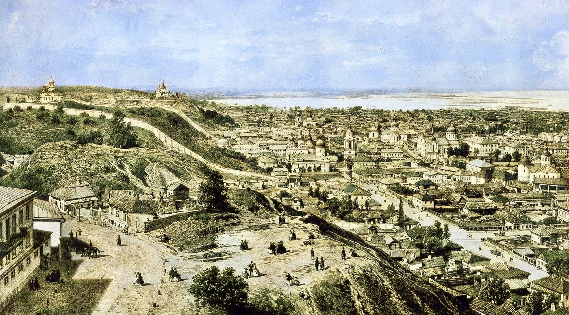 Панорама Подолу